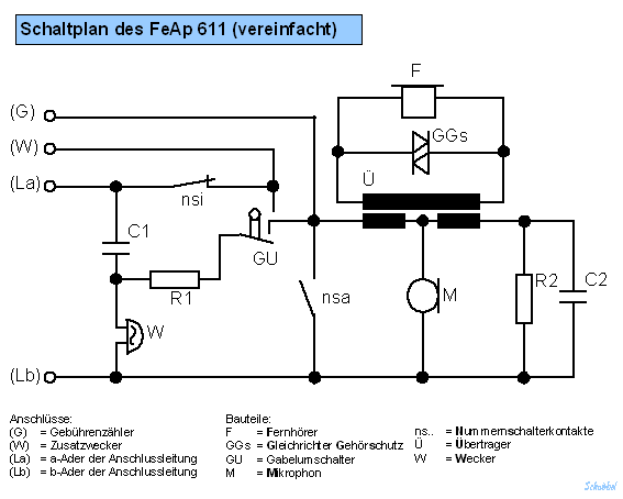 Vereinfachter Schaltplan eines FeAp 611 Zur Funktionsweise der Schaltung siehe u. a.: Nummernschalter